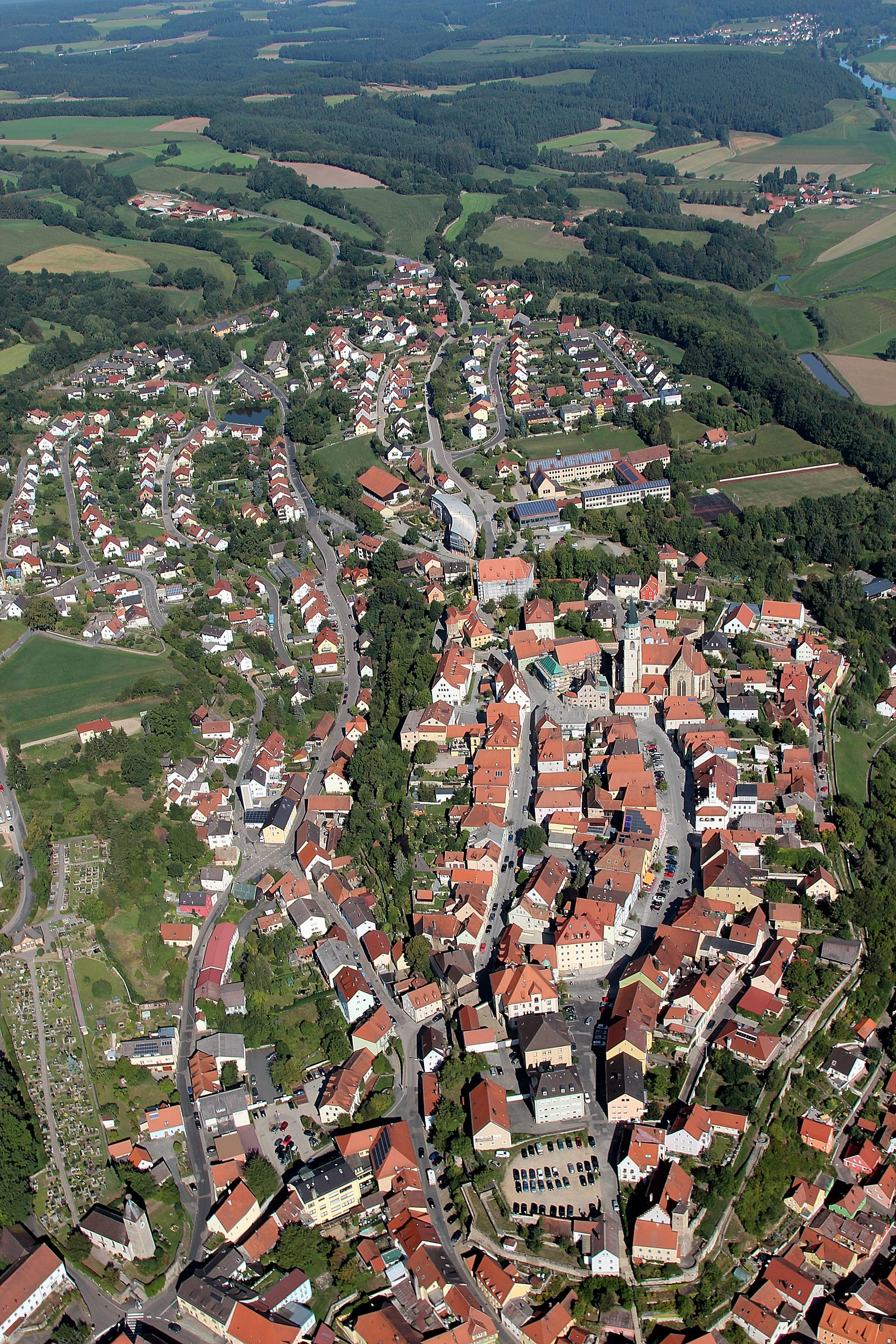 Ansicht der Stadt Nabburg, Landkreis Schwandorf, Oberpfalz, Bayern